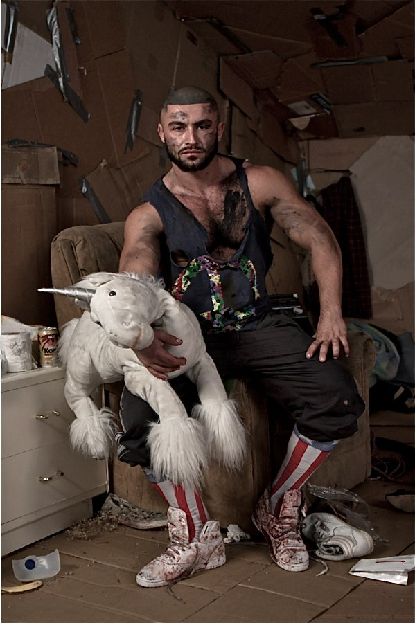 François Sagat como sem teto em LA Zombie